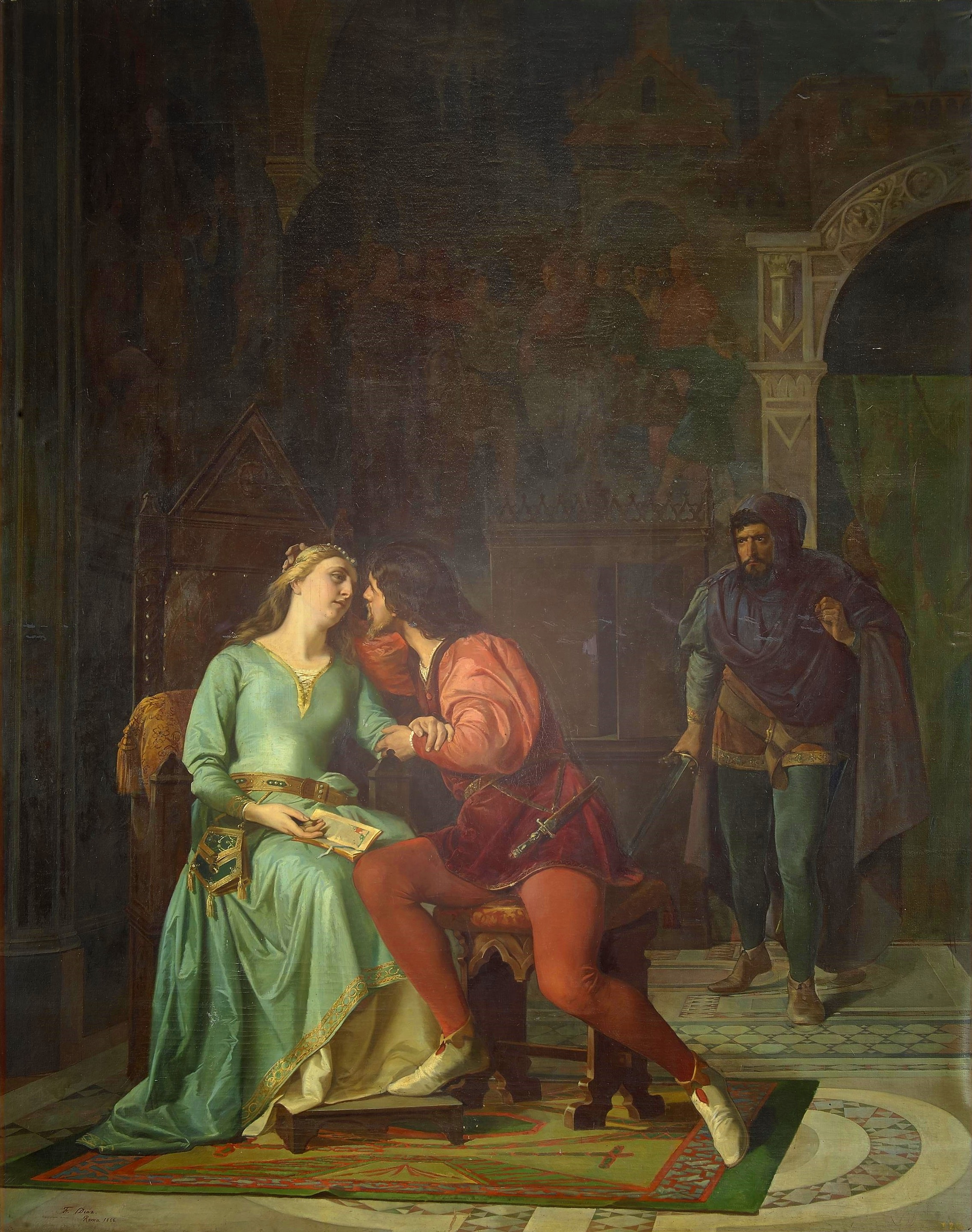 La obra representa el momento en que la dama italiana Francesca de Rímini († 1285) fue sorprendida por su esposo mientras se hallaba junto a su amante, que era hermano del primero.